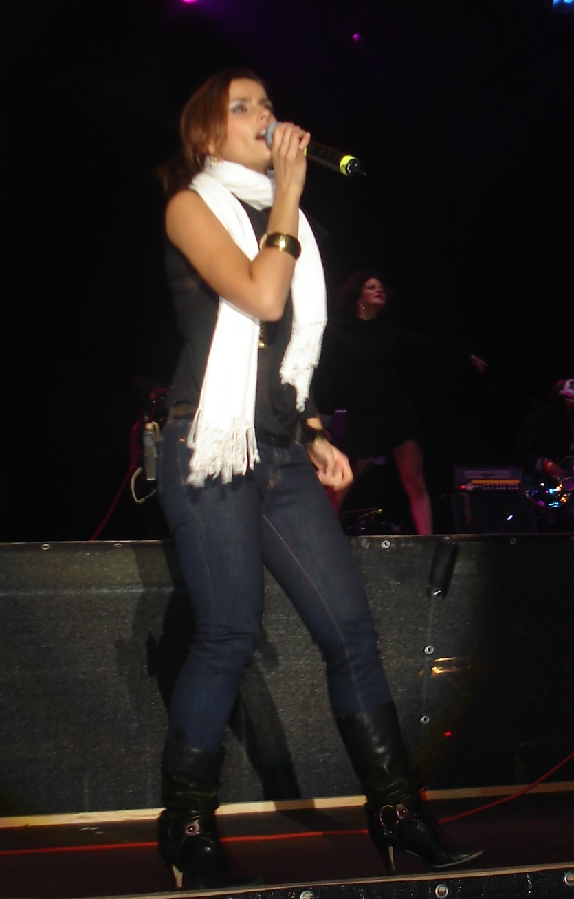 Nelly Furtado bei Rock am Ring 2006 auf der Alternastage